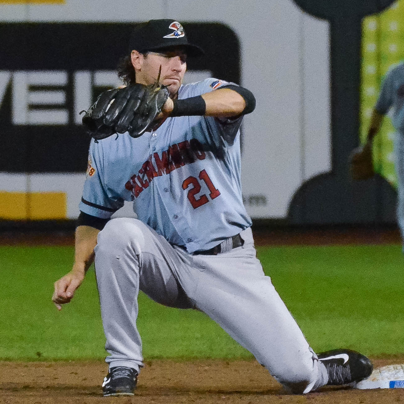 Nick Noonan